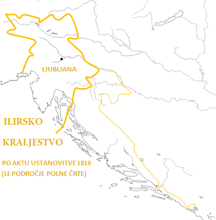 Ilirsko kraljestvo po ustanovitvenem aktu iz leta 1916